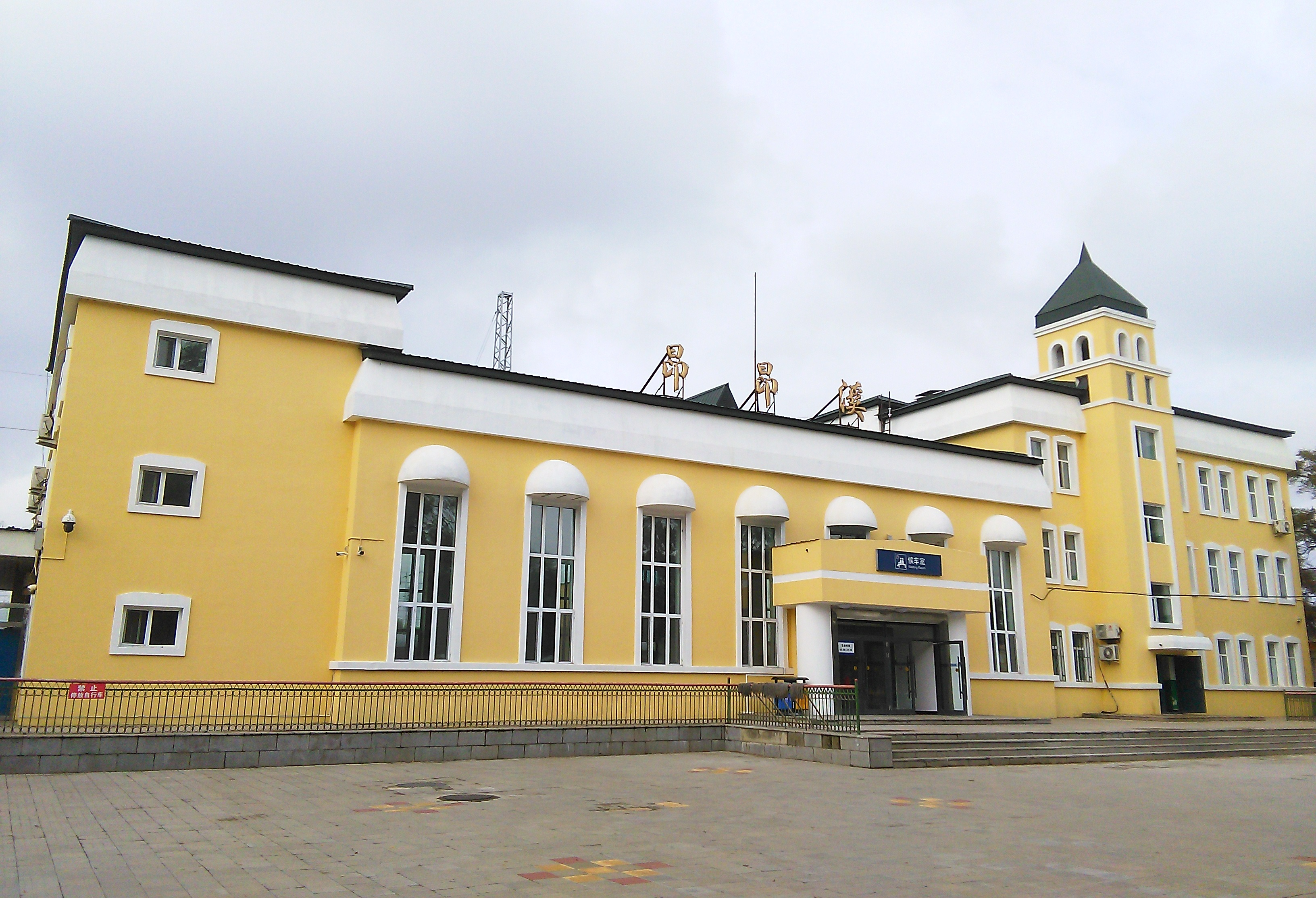 中文（中国大陆）: 昂昂溪站 2017